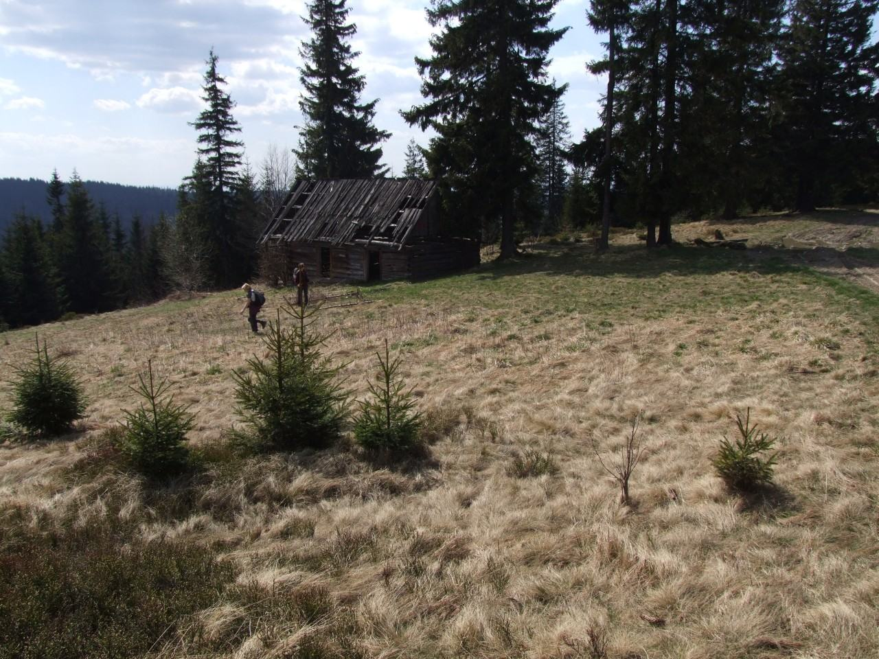 Polana Obidowiec (Gorce)